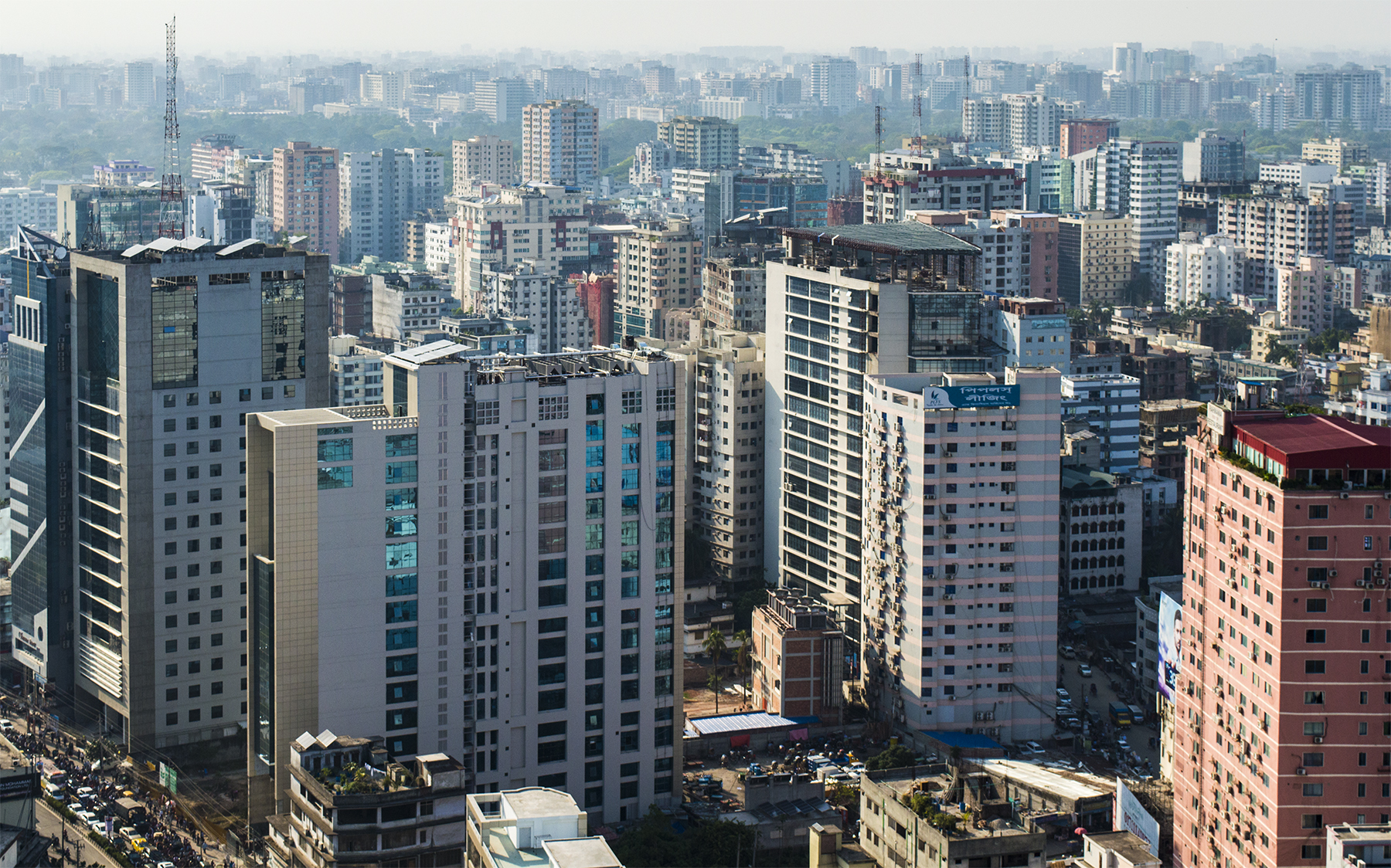 Paltan- Segunbagicha Skyline, Dhaka